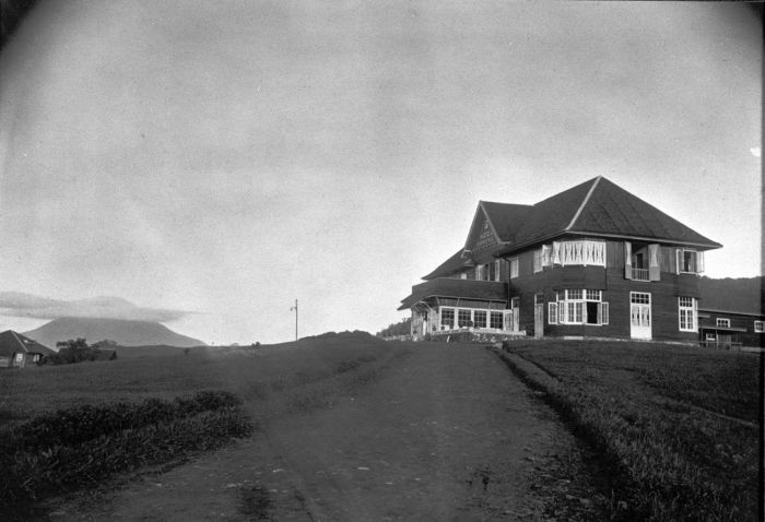 Foto. Hotel Brastagi